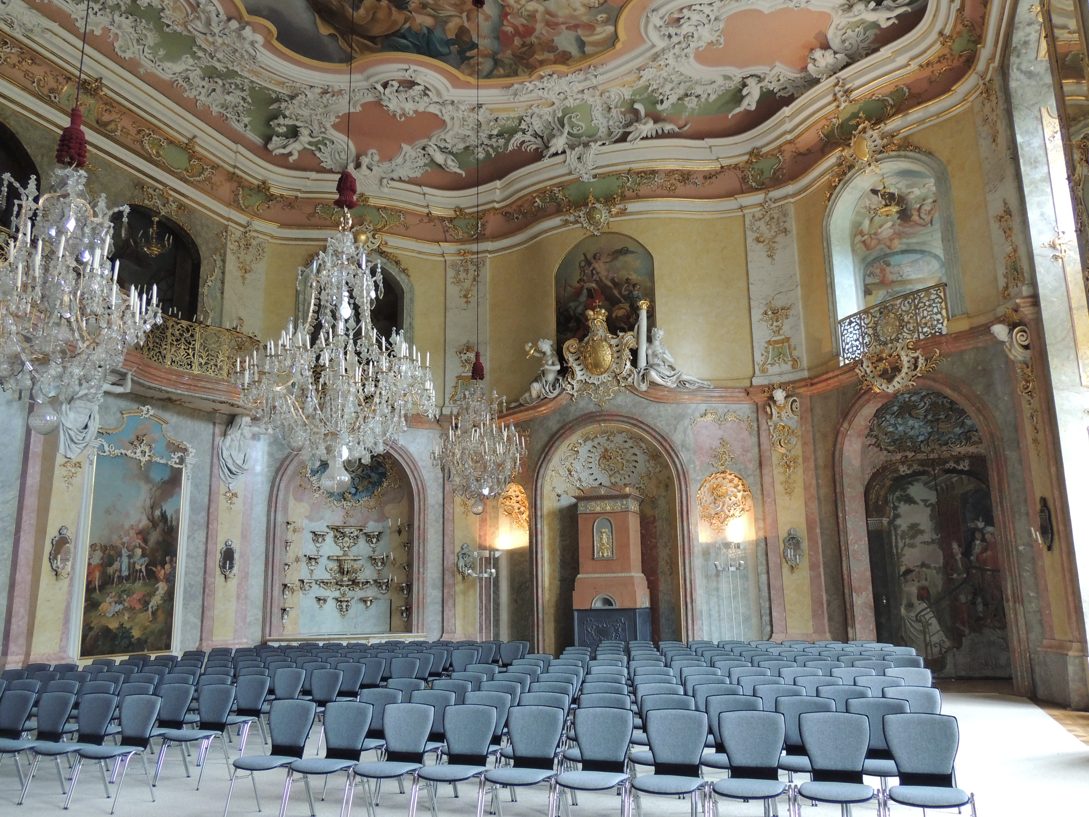 Wohn- und Prunkräume von Schloss Heidecksburg; Festsaal